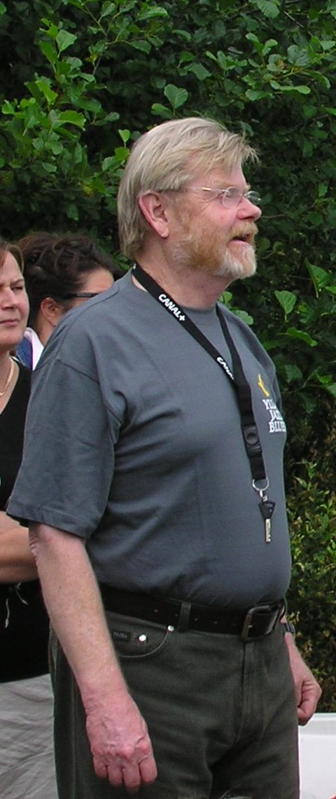 Eero Raittinen suomalainen laulaja